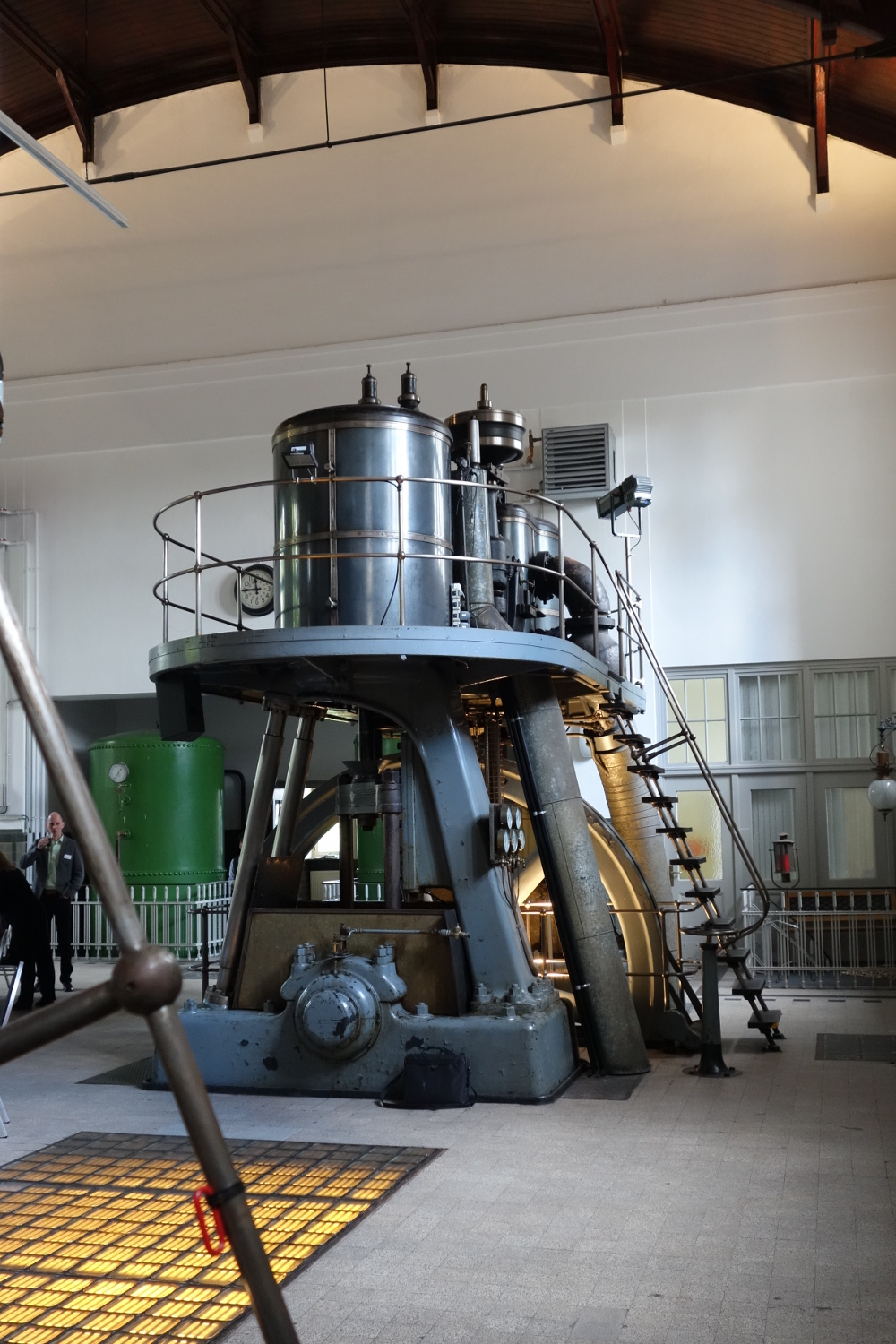 Wasserwerk Bockum - Maschine 1